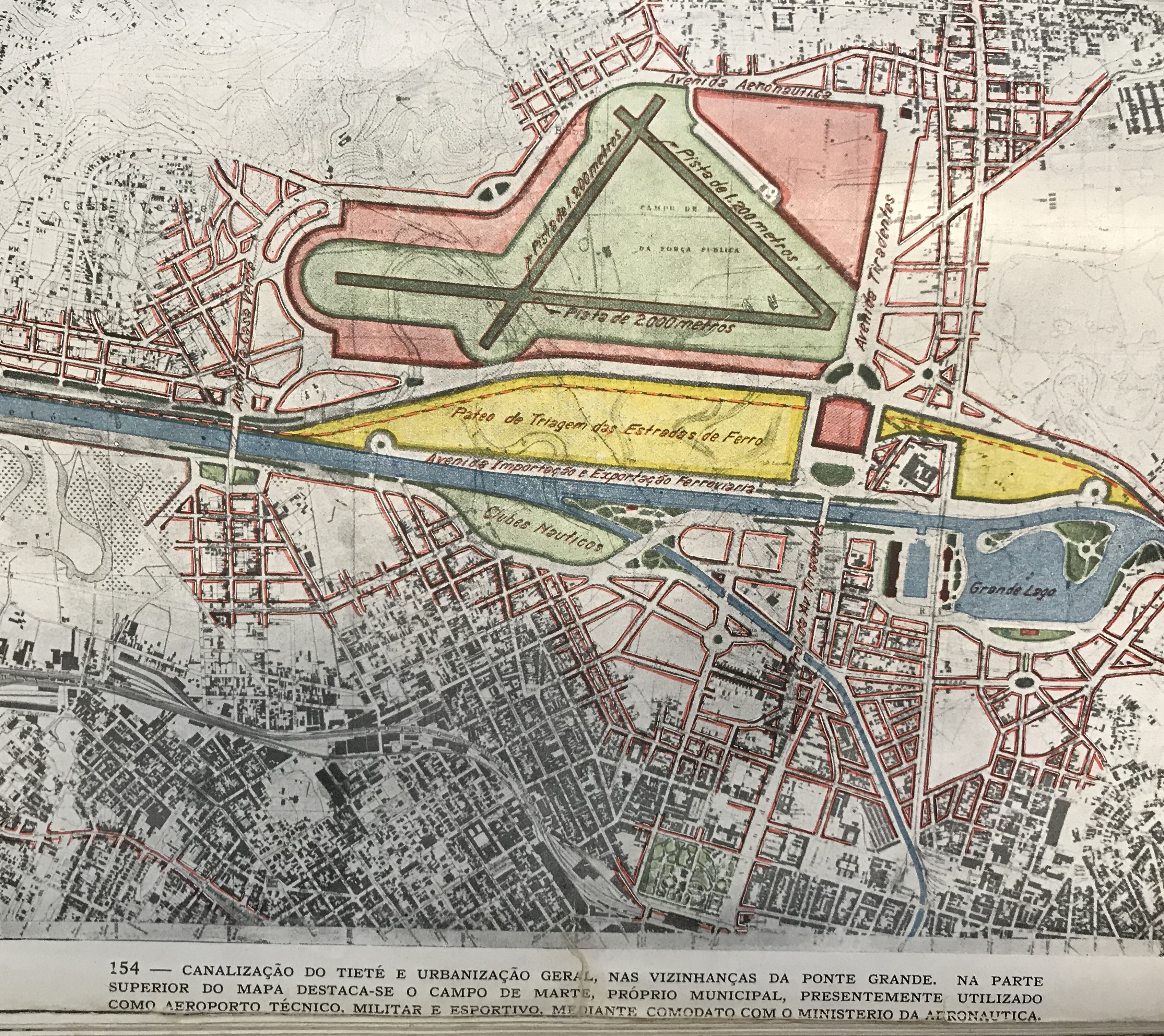 IMAGEM 4